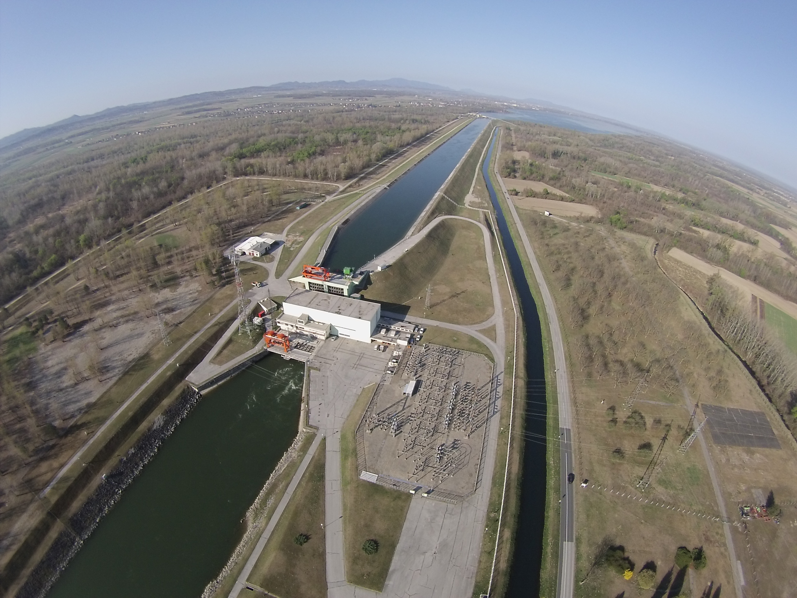 Snimka iz zraka